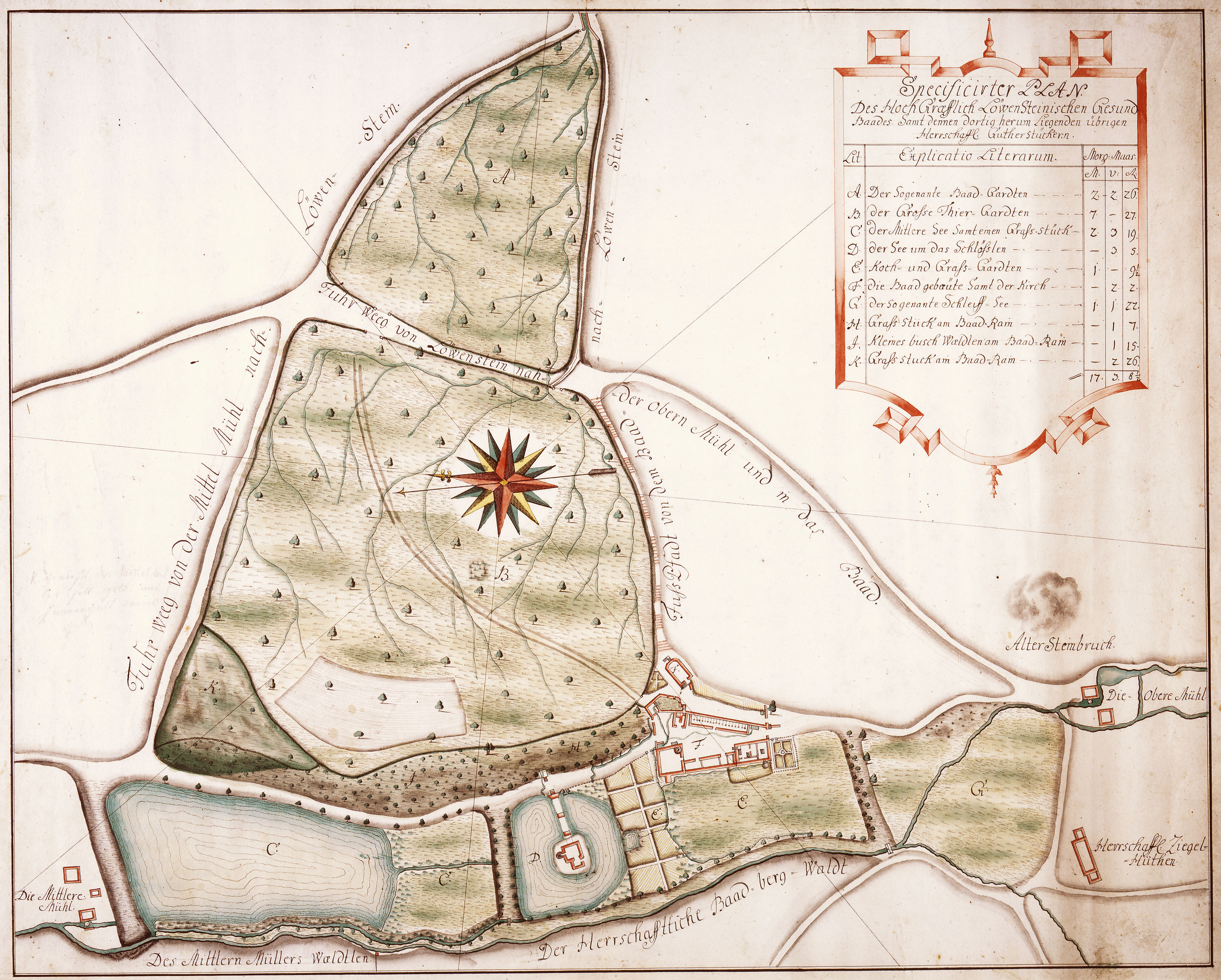 "Löwensteinisches Gesundbad", Teusserbad bei Löwenstein, Karte 18. Jhd.